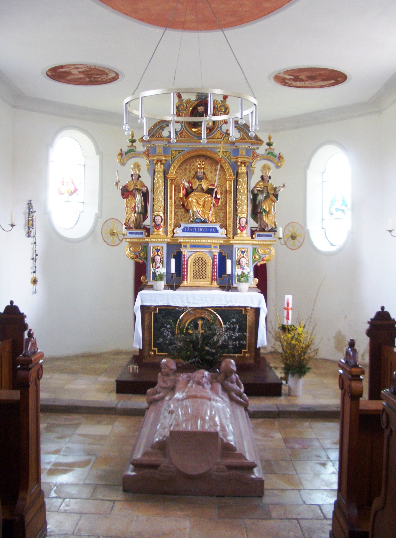 Inneres der Kirche St. Peter und Paul, Starnberg